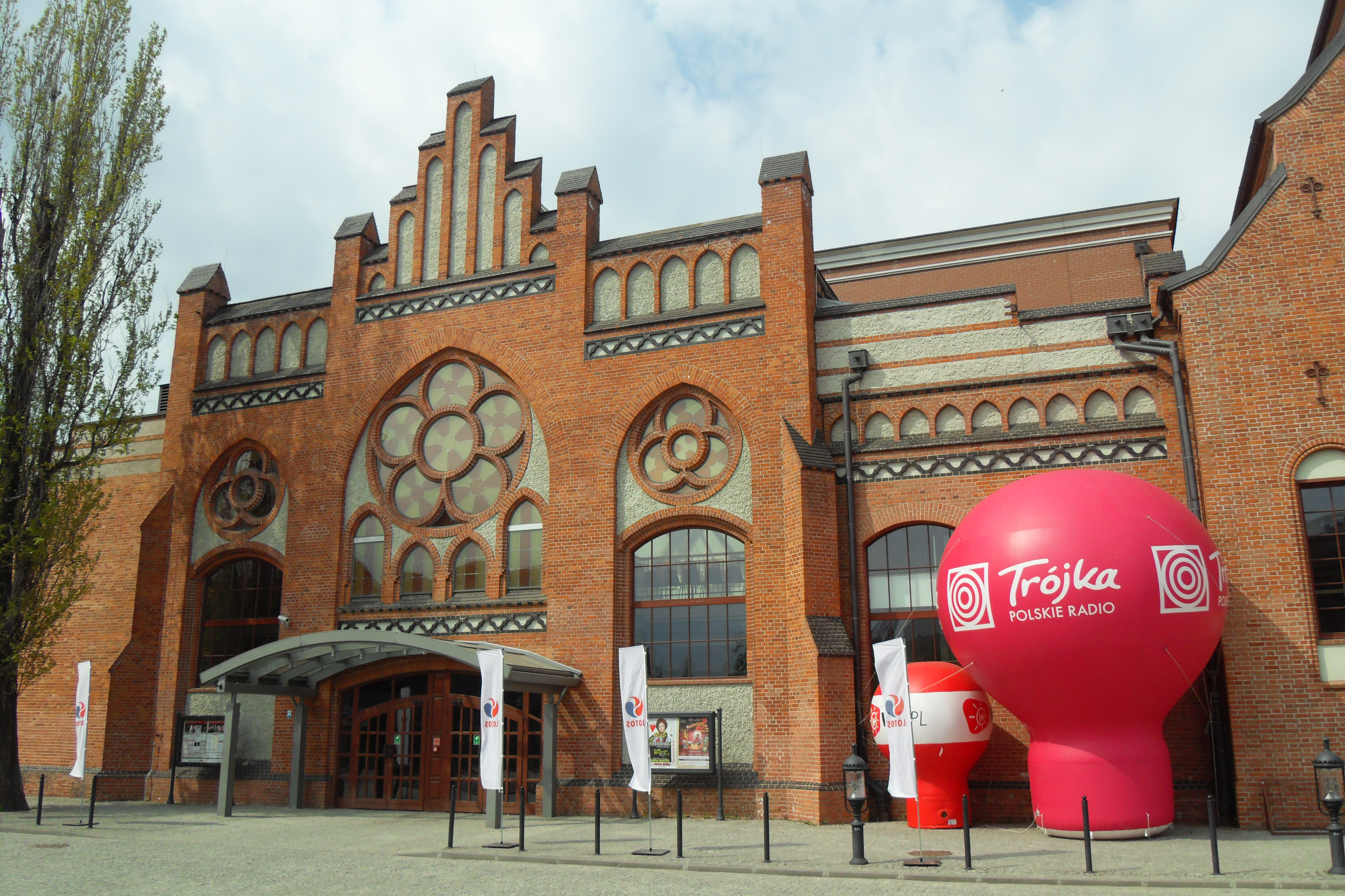 Gdańsk Ołowianka, ul. Ołowianka 1, Siesta Festival 2014 (25-27 kwietnia 2014).